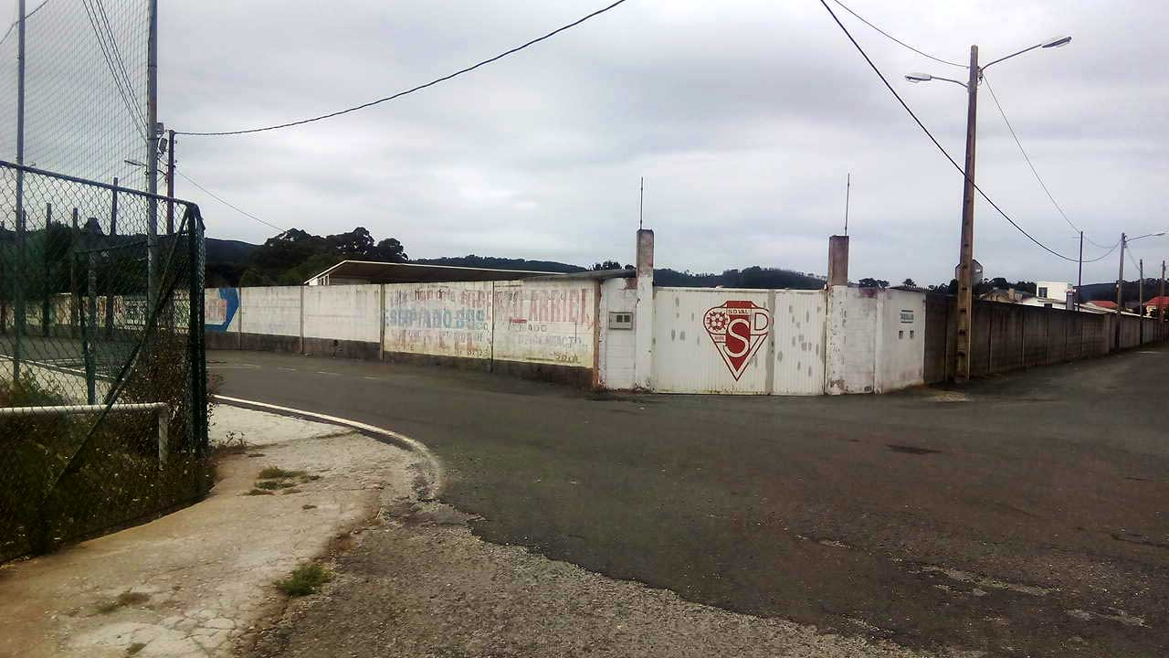 SD O Val, Sinde O Val.